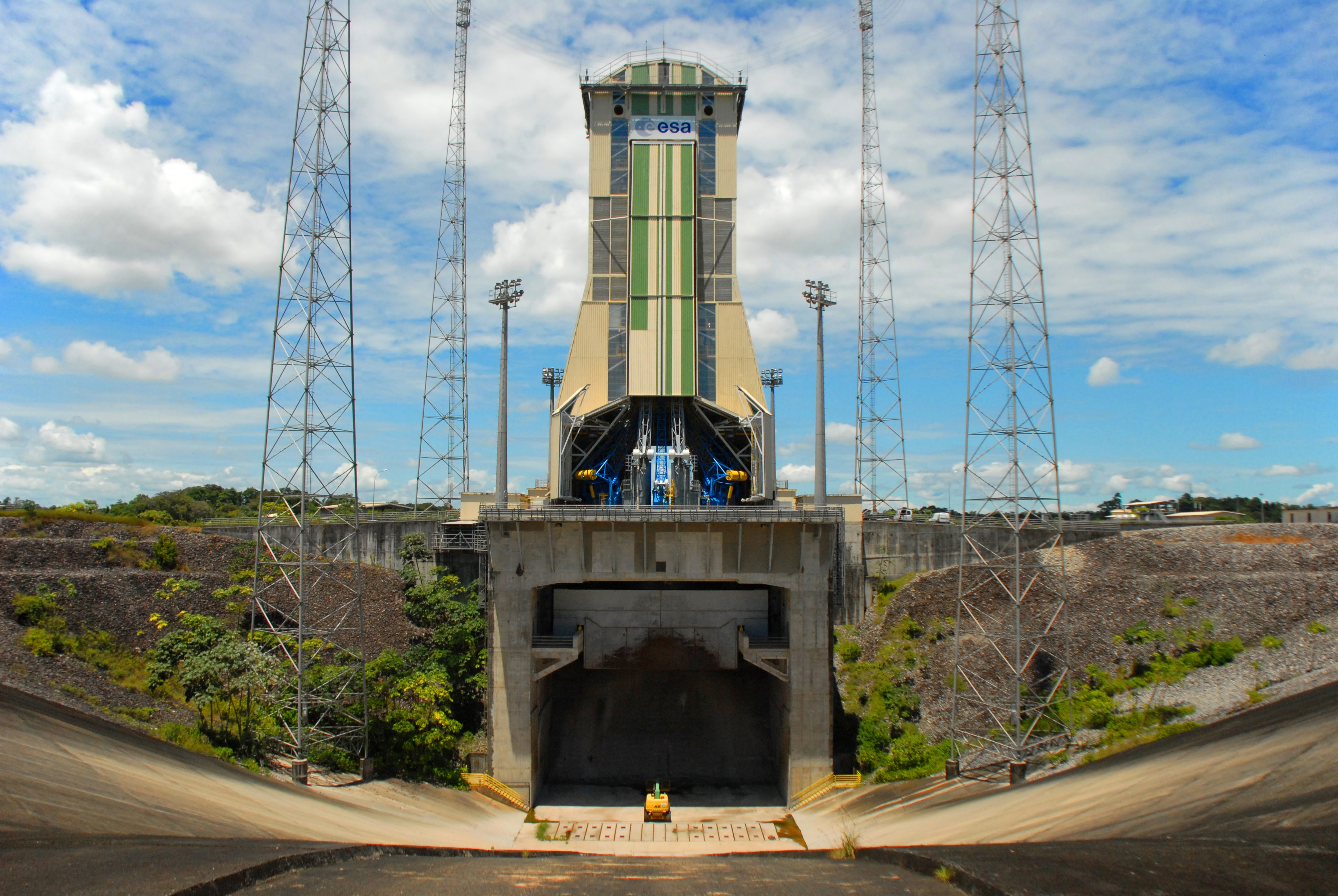 Pas de tir des fusées Soyouz au centre spatial guyanais de Kourou. Au premier plan, le carneau.